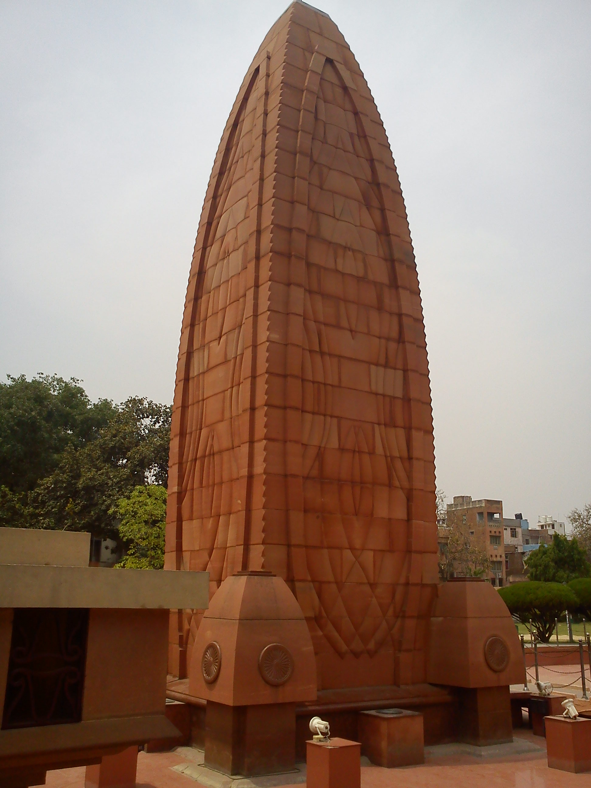 ജാലിയാം_വാലാ_ബാഗ്-സ്മാരകം